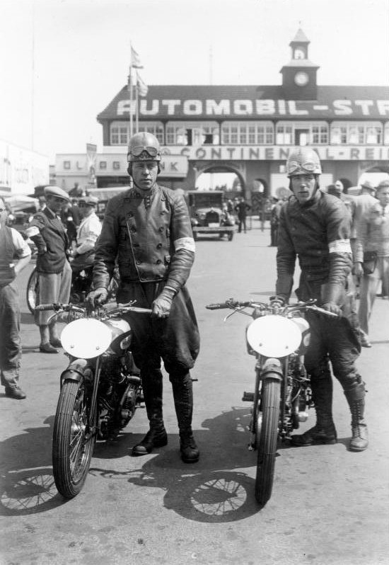 Motorradrennen, Avus, Berlin Scherl Bilderdienst Berlin. Avus.- Die beiden schwedischen Motorradfahrer Sunqvist und Kalen (links), ,1933 24335-33